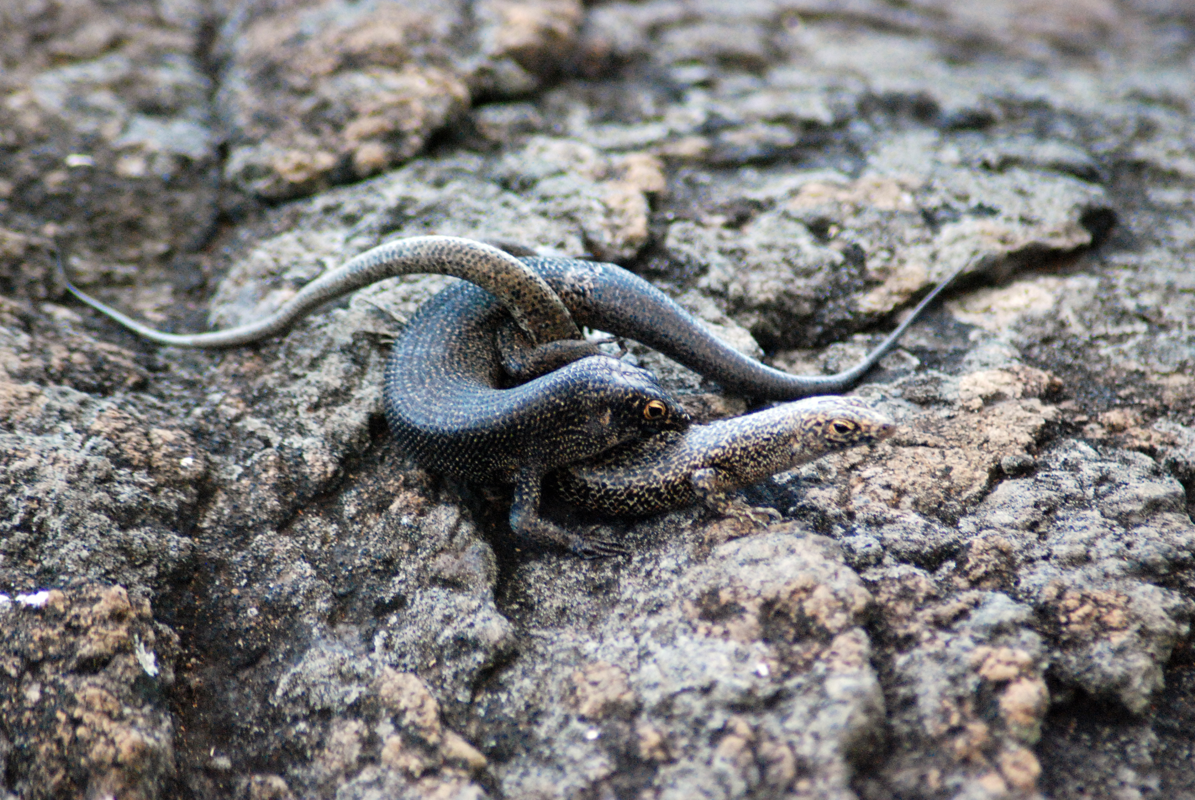 Lagartixas (mabuia - Euprepis atlanticus) endêmicas de Fernando de Noronha, em cópula.